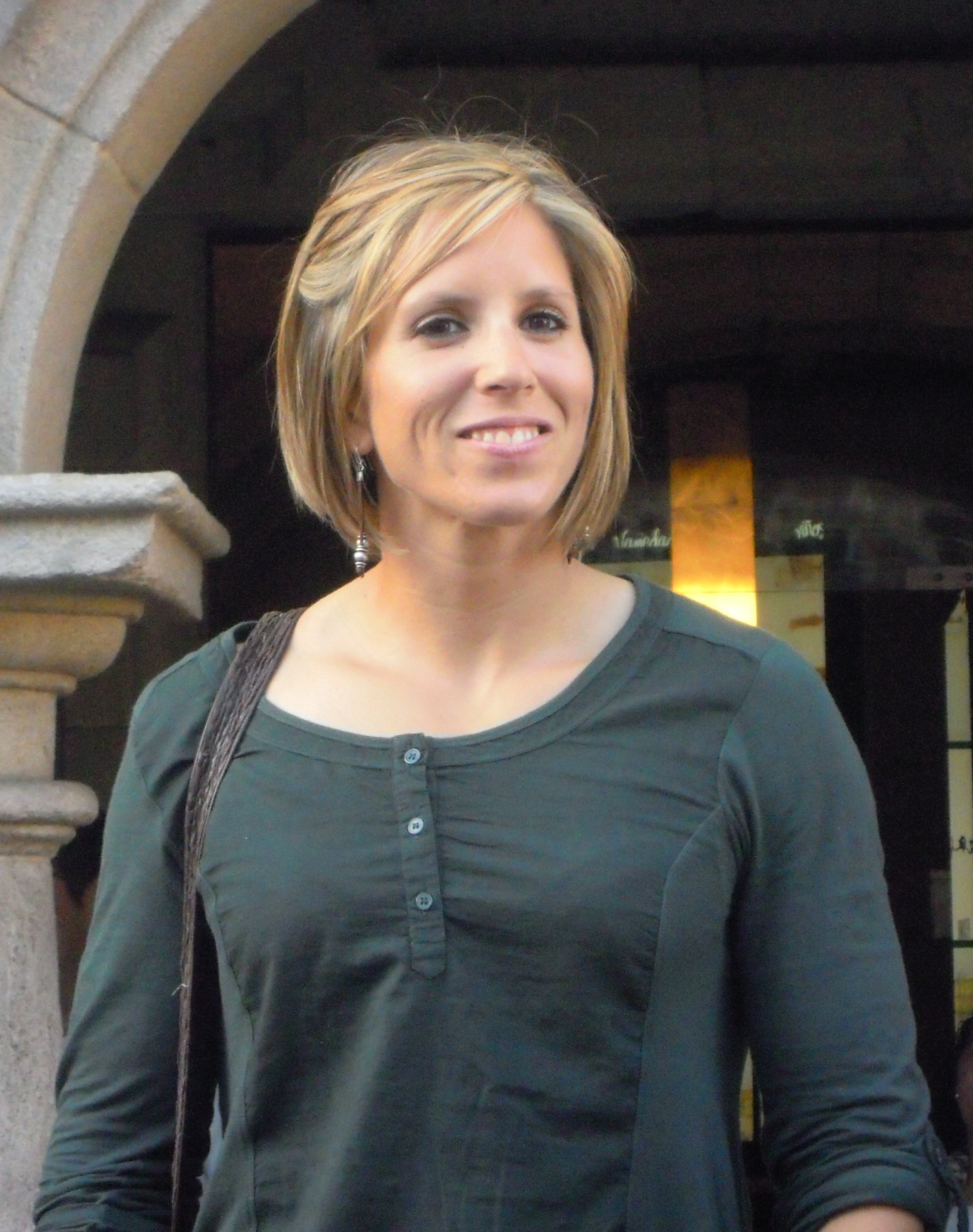 Teresa Portela na benvida organizada polo concello de Pontevedra aos cinco Galegos nos Xogos Olímpicos de 2012 vinculados á vila